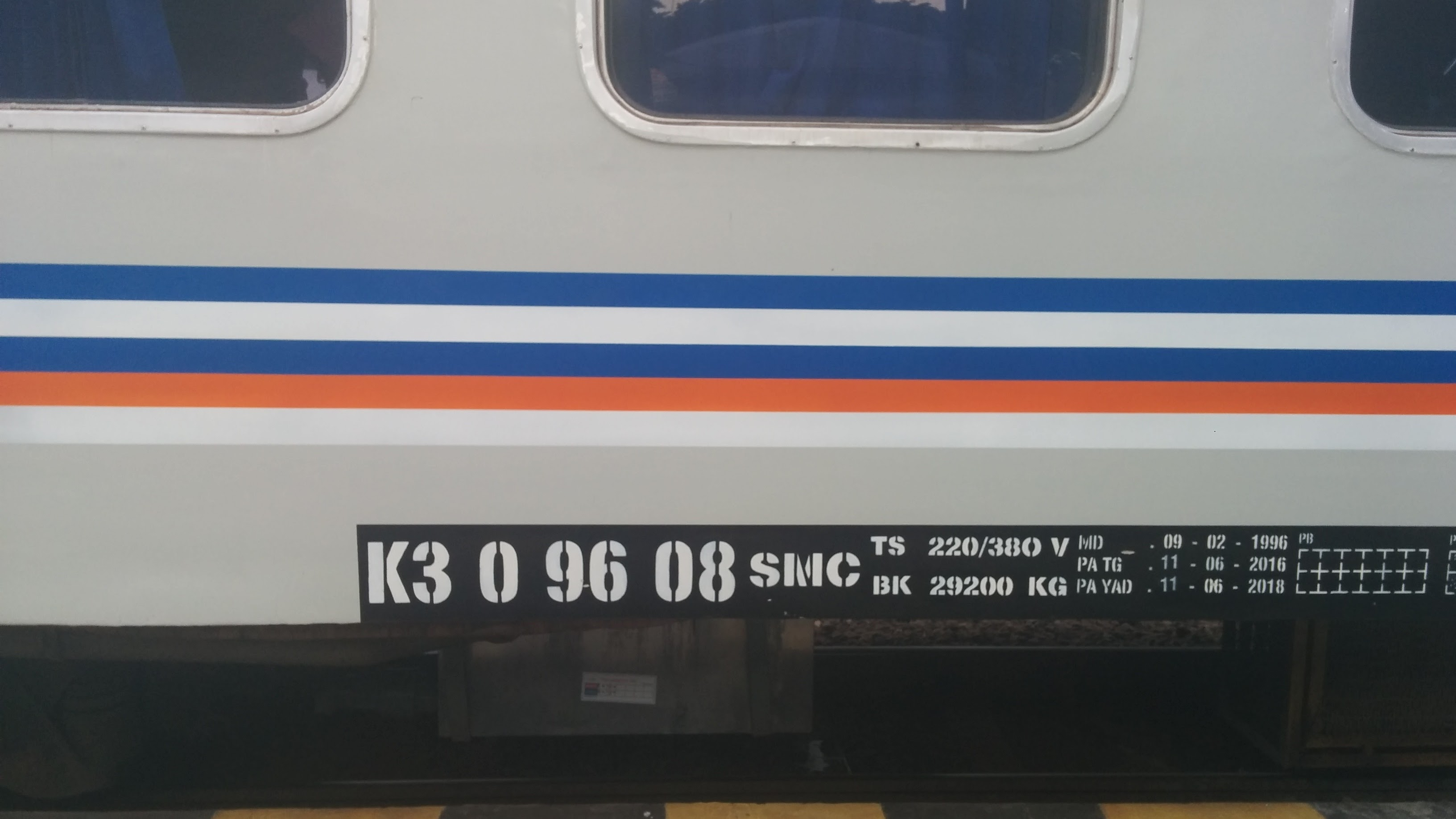 Contoh Penomoran Kereta Ekonomi di Indonesia, dalam hal ini K3 0 96 08 BW eks. SMC. Gambar diambil pada saat Kereta api Kaligung masih menggunakan Rangkaian Borobudur.